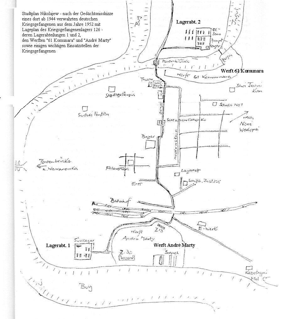 Stadtplan Nikolajew - Zeichnung aus dem Gedächtnis nach der Repatriierung